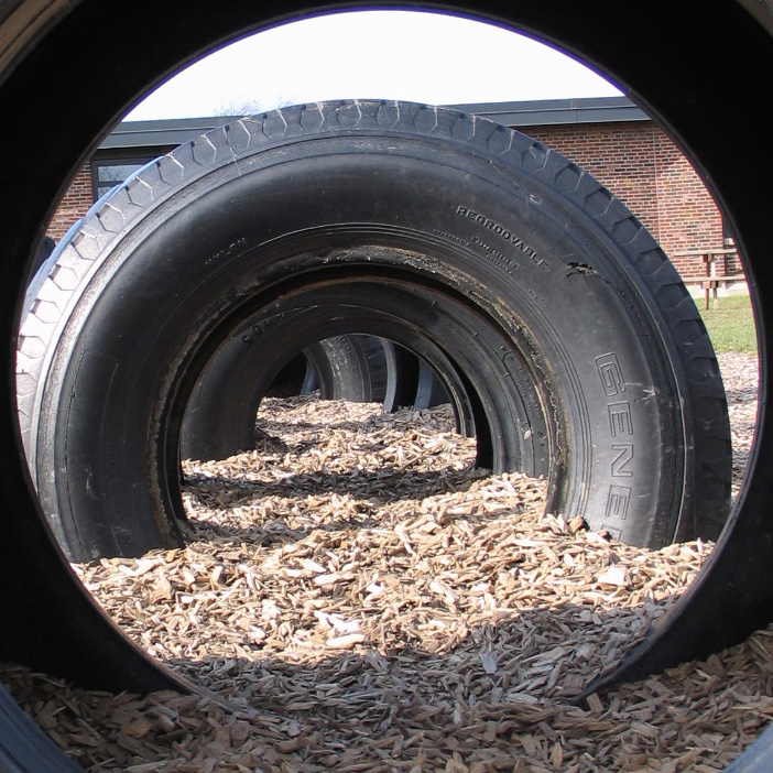 Parcours utilisant de vieux pneus, pour le jeu ou l'entrainnement sportif ; les participants sont invités à ramper sur le mulch de bois déposé au sol, en passant au travers de l'anneau de chaque pneu. C'est un exercice intéressant en termes de psychomotricité, mais des débats existent quant à l’innocuité de contacts répétés avec le caoutchouc industriel, notamment en cas de blessures de la peau (sont notamment évoqués des risques d'allergie au latex, ou induits par la présence de HAP et de COV dans le matériau constituant le pneuthrough tire crawl through